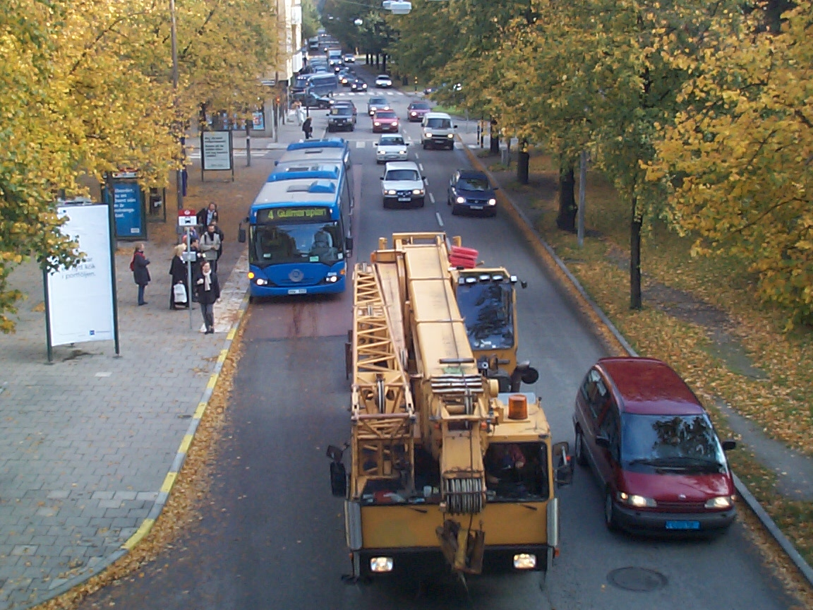 Traffic on Valhallavägen (a street in Stockholm, Sweden).